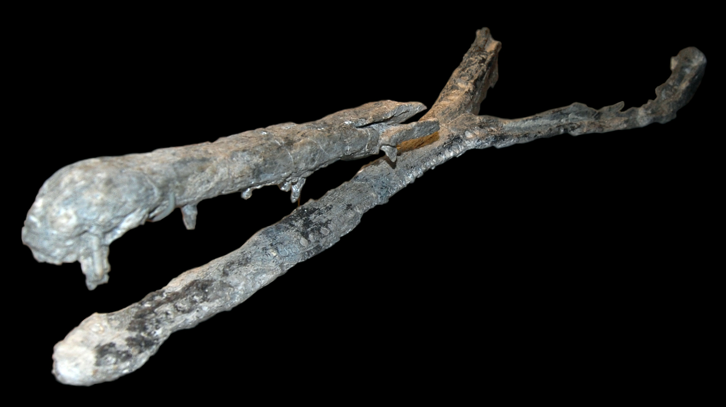 Naturhistorisches Museum Wien